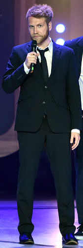 Rocketbeans TV (Daniel Budiman, Nils Bomhoff, Arno Heinisch, Simon Krätschmer, Etienne Gardé) bei der Verleihung des Webvideopreises 2015